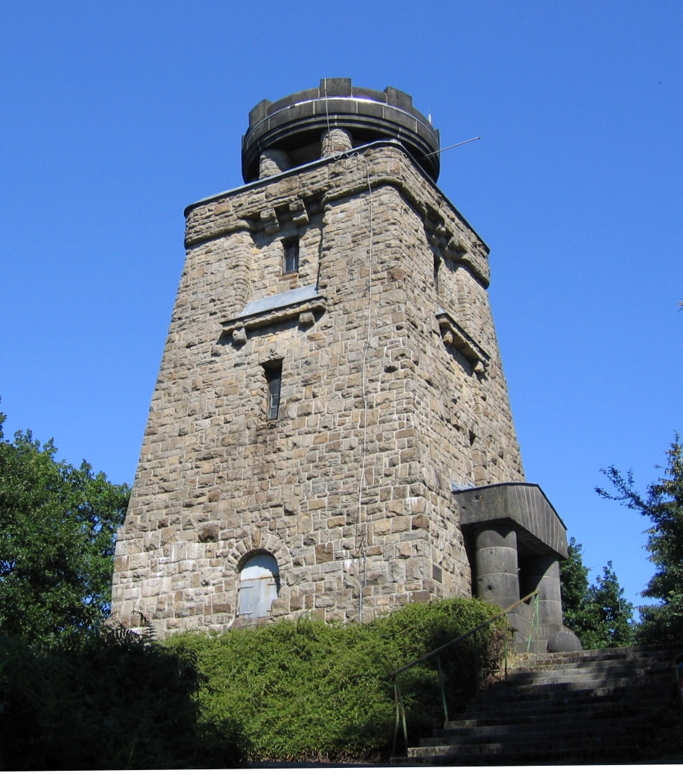 Bismarckturm in Iserlohn